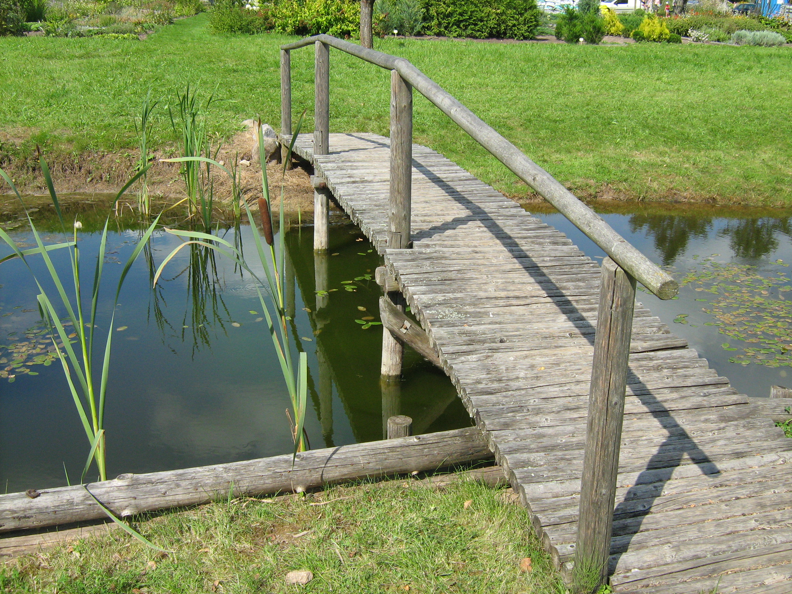 Medinis tiltas